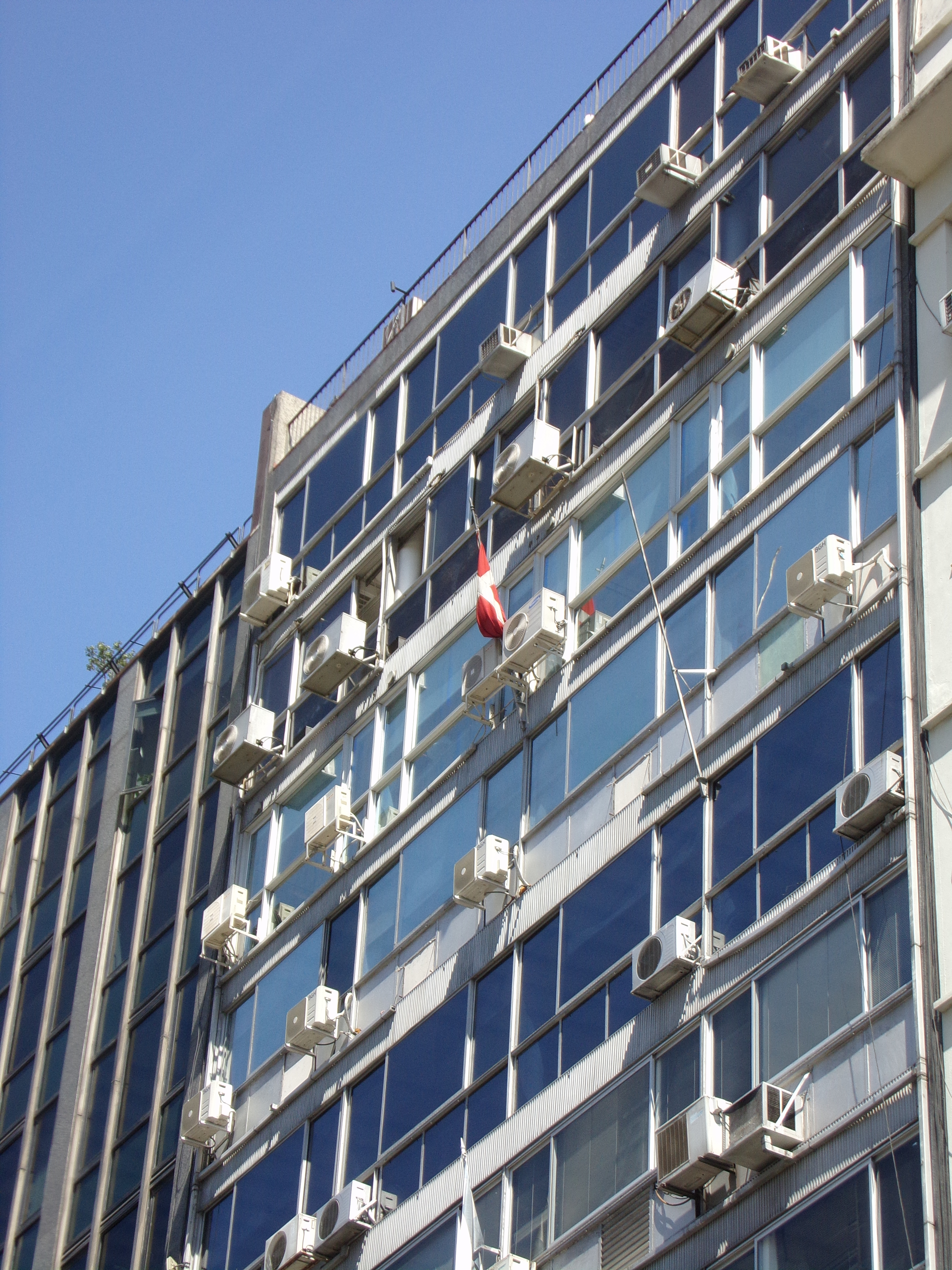 Embajada de Dinamarca en Buenos Aires.